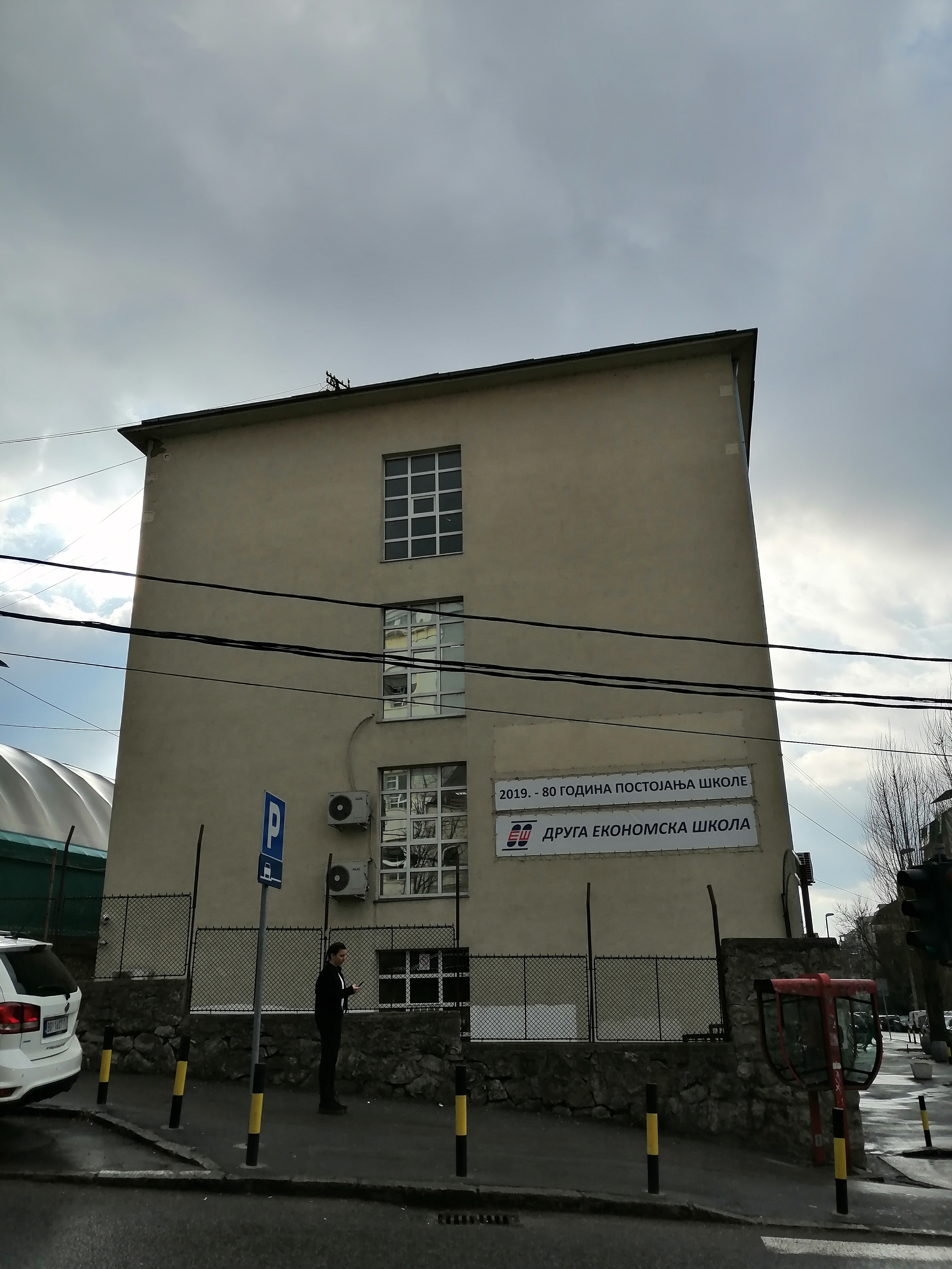 Srpski (latinica): Druga ekonomska škola u Beogradu